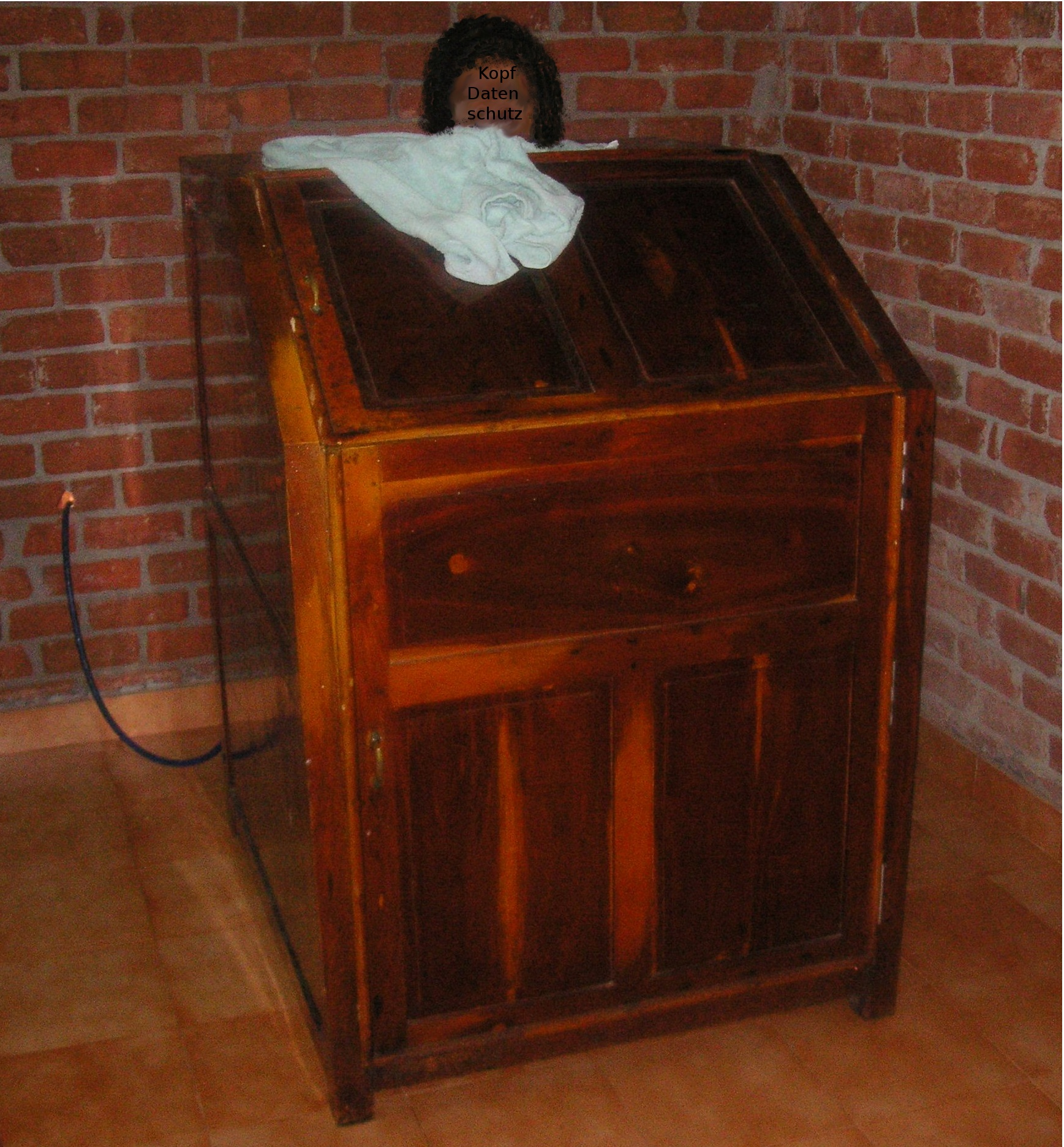 Saunakasten zum Herausschwitzen der Giftstoffe Kurabschluss